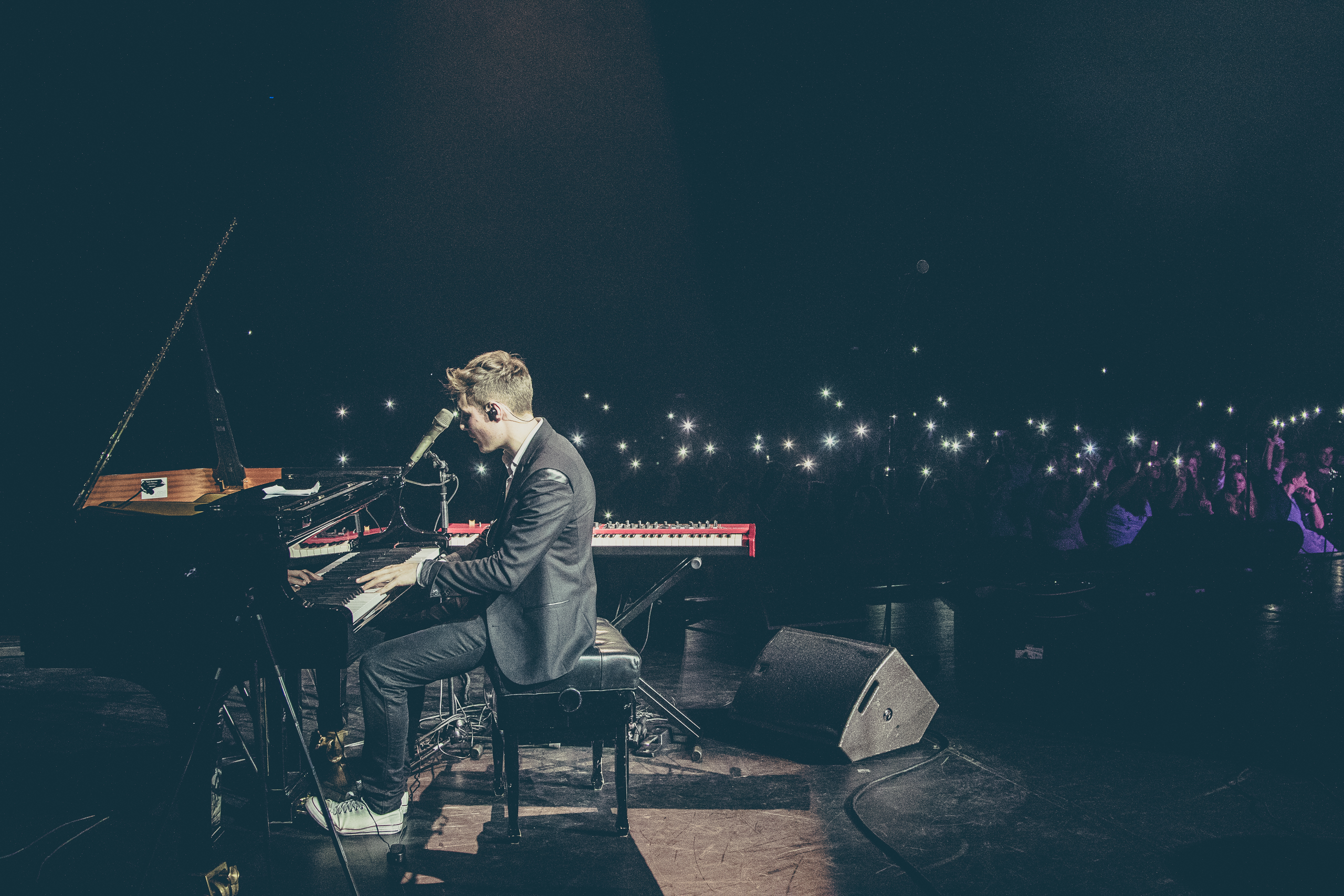 Florian Franke bei seinem letzten Konzert der Stadtgeflüster-Tour in der Stravinski-Halle Montreux